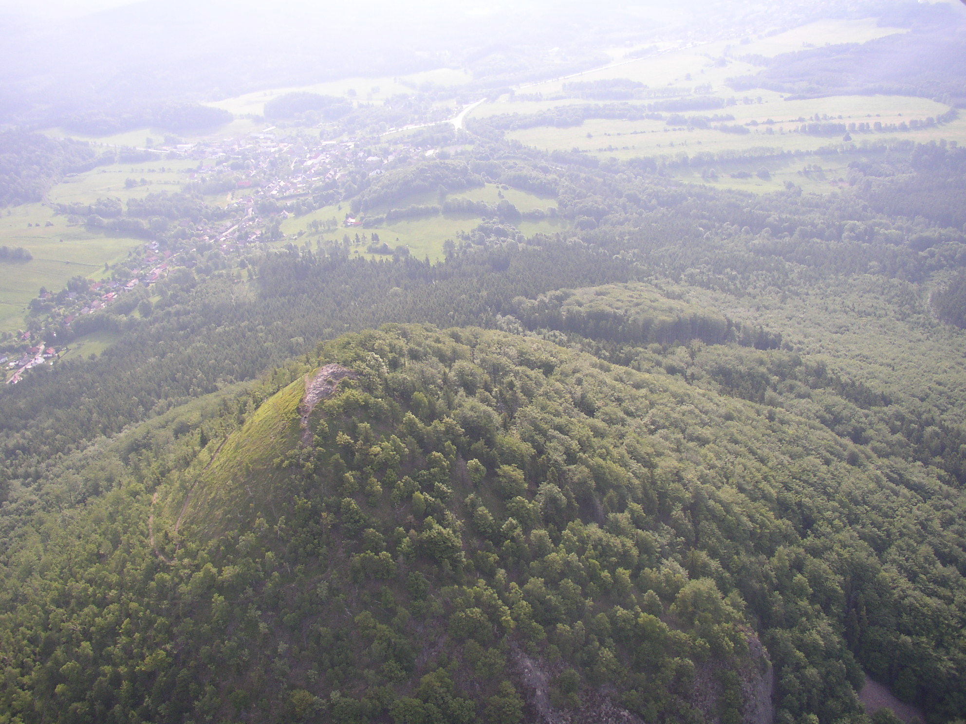 Gipfel von Klíč, im Hintergrund Svor